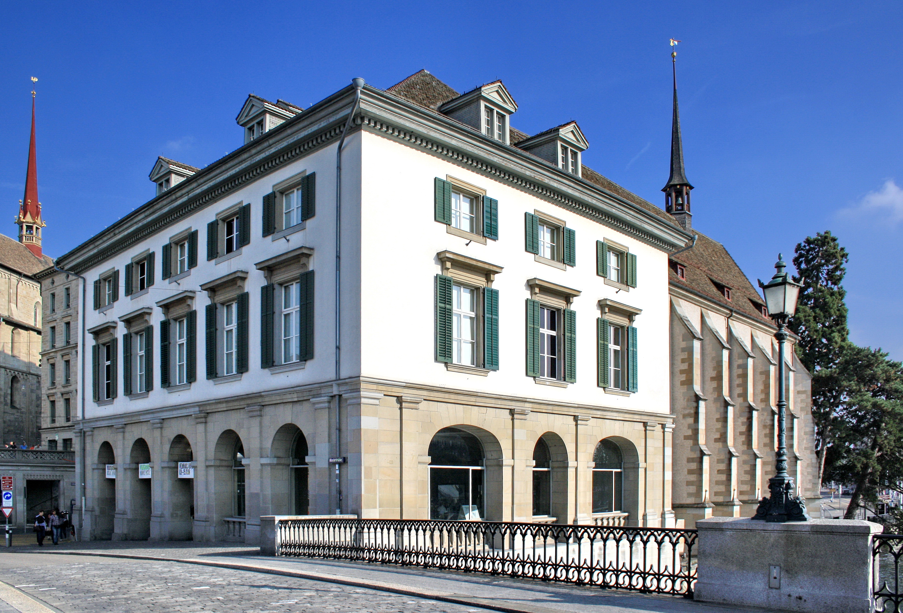 Helmhaus and Wasserkirche and Limmatquai in Zürich (Switzerland) as seen from Münsterbrücke, Grossmünster in the background.